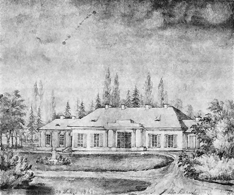 Dwór Orzeszków, widok od strony podjazdu, dwór parterowy ze skrzydłami i portykiem kolumnowym zwieńczonym schodkowym przyczółkiem w ryzalicie środkowym.Napis: Zakoziel. napis na podkładzie: G. Grodzieńska Zakoziel, maj. Orzeszków. Rys. ołówkiem podmalowany akwarelą i gwaszem. 19,7 x 23,4 cm.